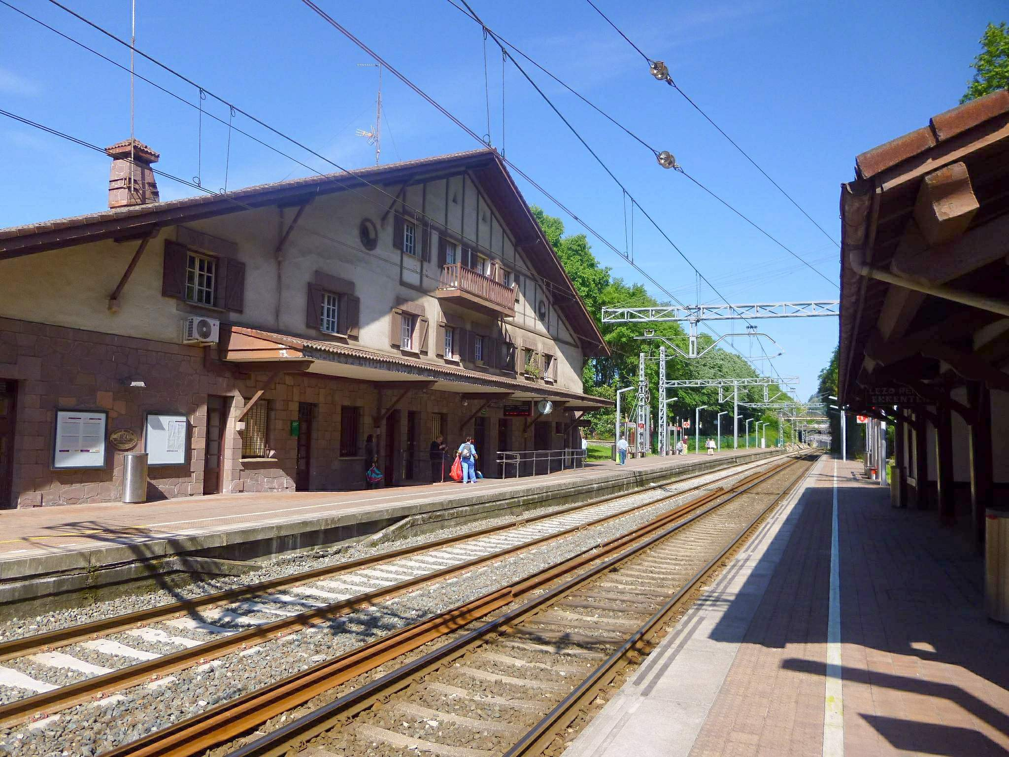 Estación de Lezo-Rentería (Rentería, Gipuzkoa)